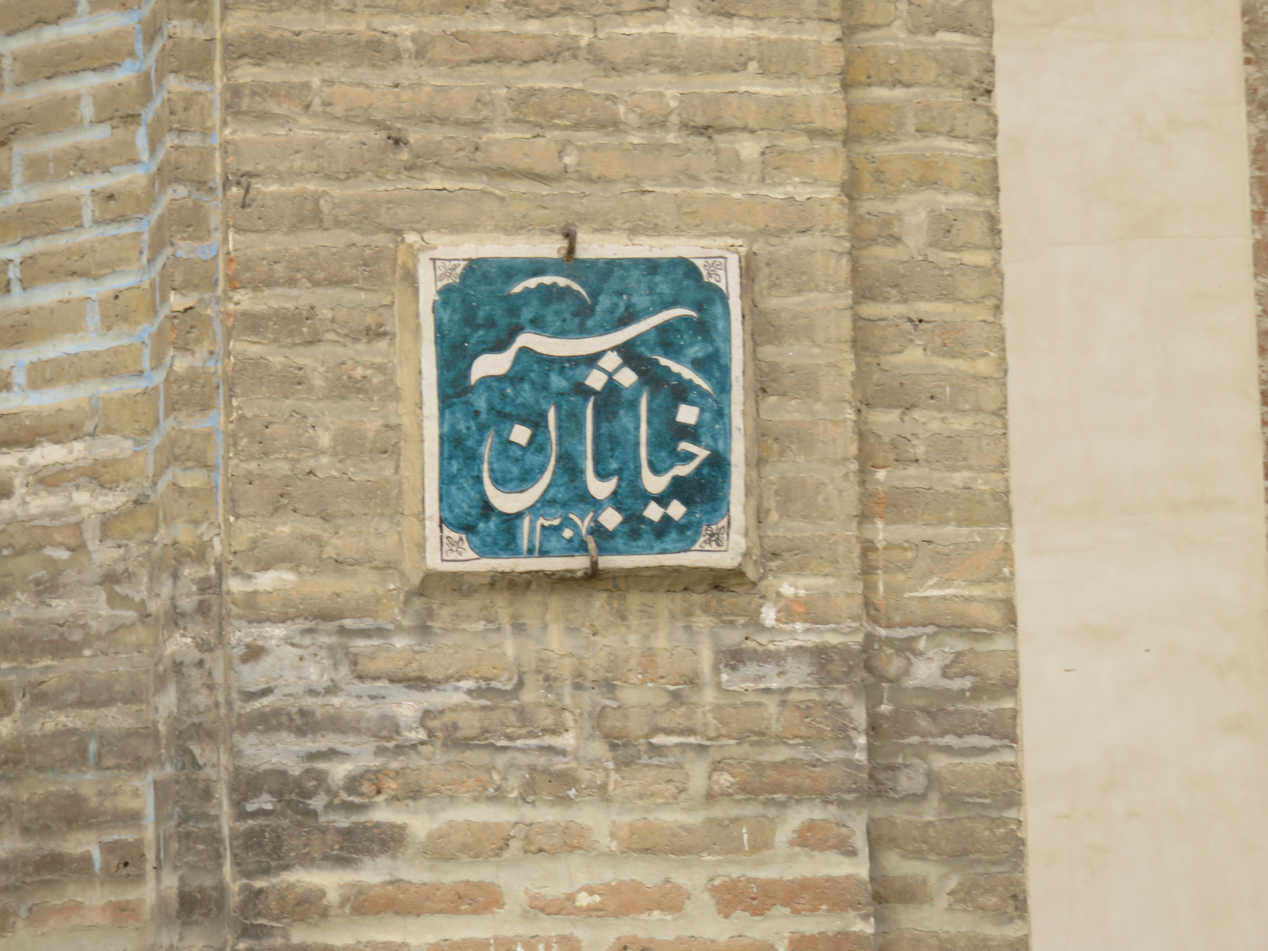 خیابان سپه